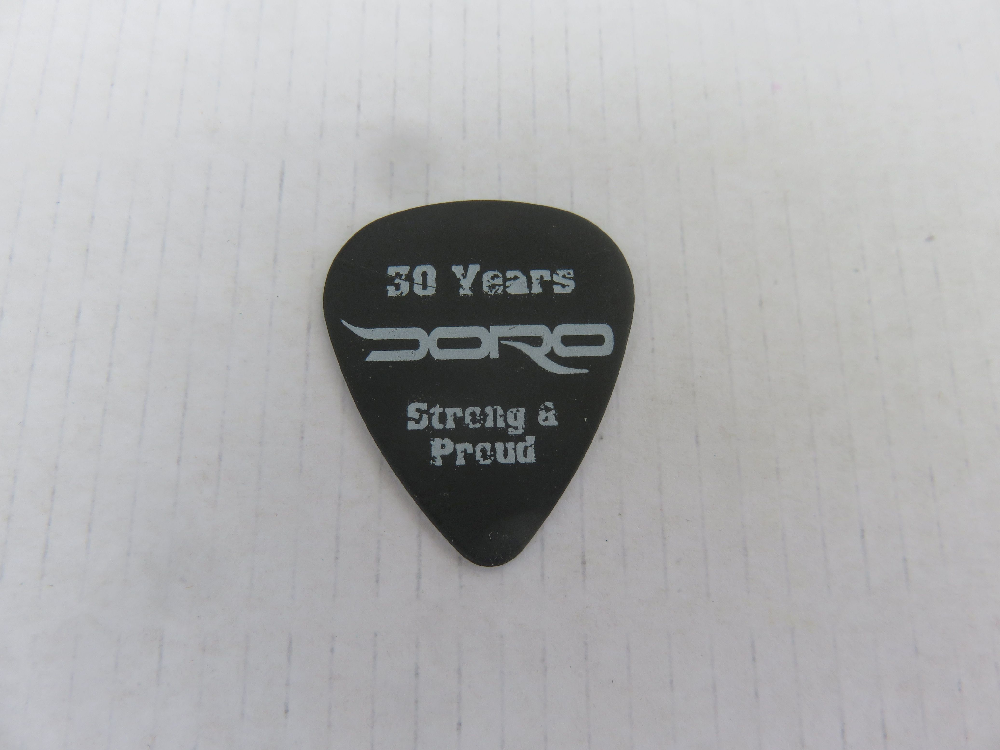 Plektrum von Gitarrist Luca Princiotta nach einem Konzert von Doro in der Halle 101 (Am Neuen Rheinhafen 6) in Speyer am 13. Mai 2014. Auf der Vorderseite des Plektrums steht "30 Years Doro – Strong & Proud", auf der Rückseite der Name von Luca Princiotta.